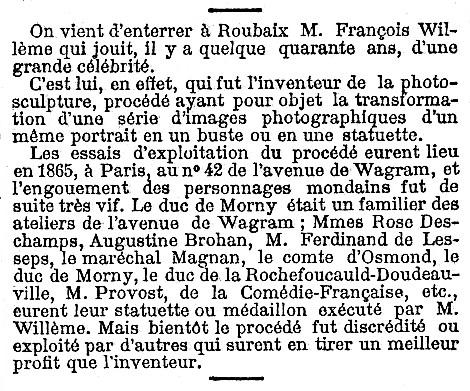 Extrait de la rubrique nécrologique du journal Le Temps, faire-part de la disparition et l'enterrement de François Willème inventeur de la photosculpture.